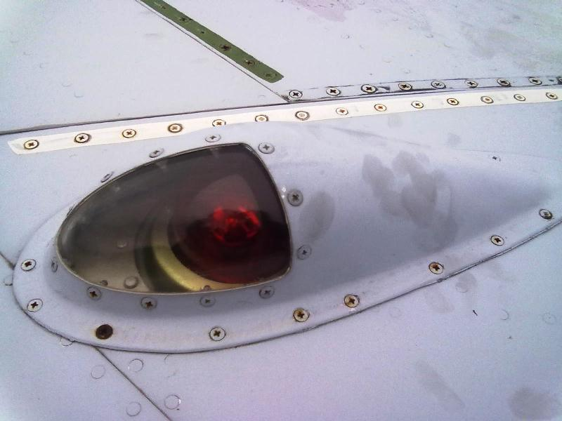 Бортовой аэронавигационный огонь БАНО-57 красный